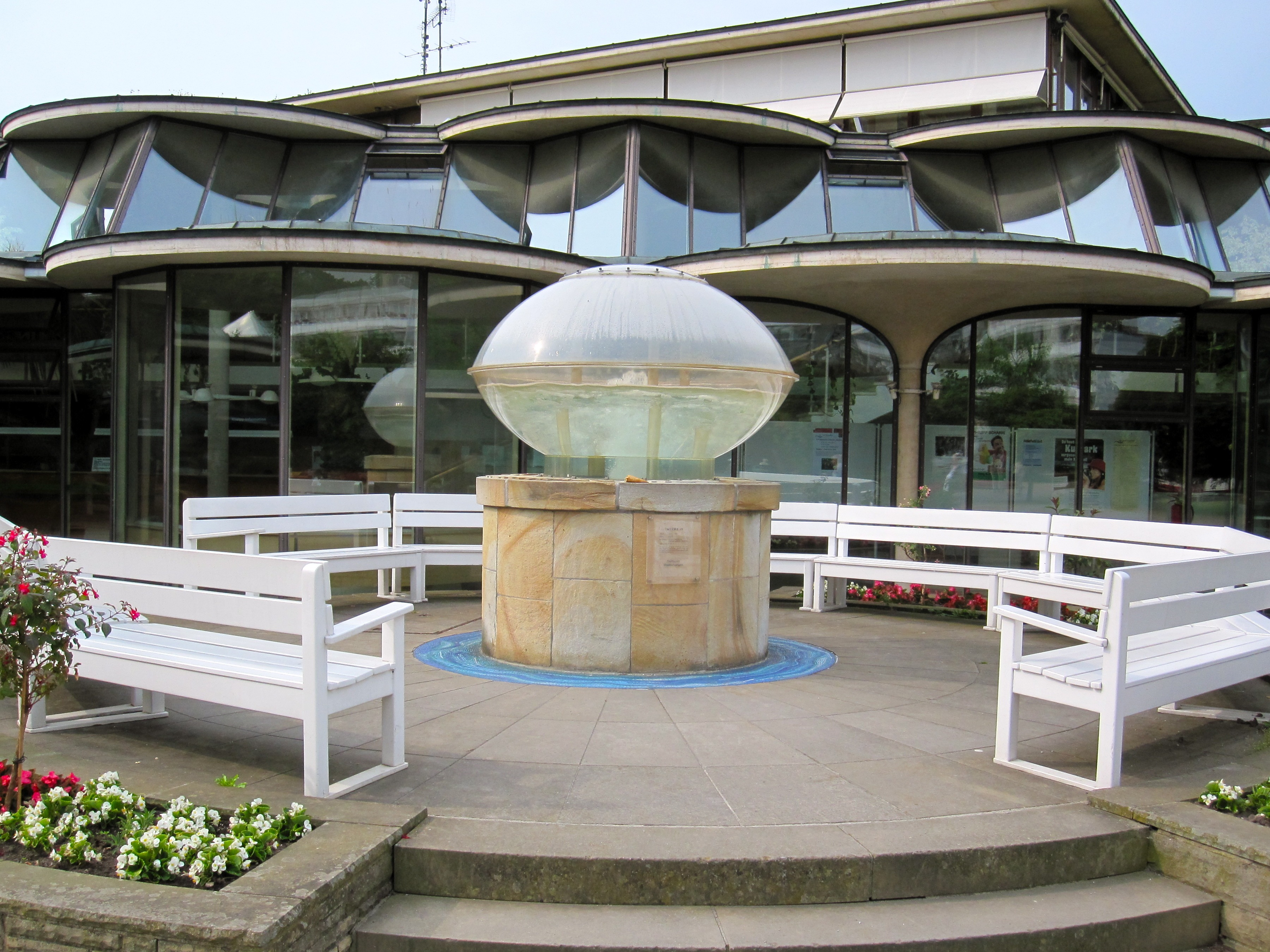 Thermalsprudel III vor dem Kurgastzentrum in Bad Salzuflen